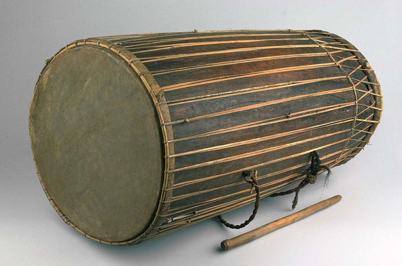 Slaginstrument. Dubbelvellige tonvormige trom met slaghout Unknown language: Ganrang